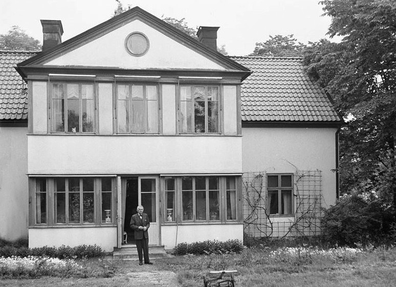 Ålstens Gård, Axel Gauffin, Överintendent på Nationalmuseum, står framför sitt hem